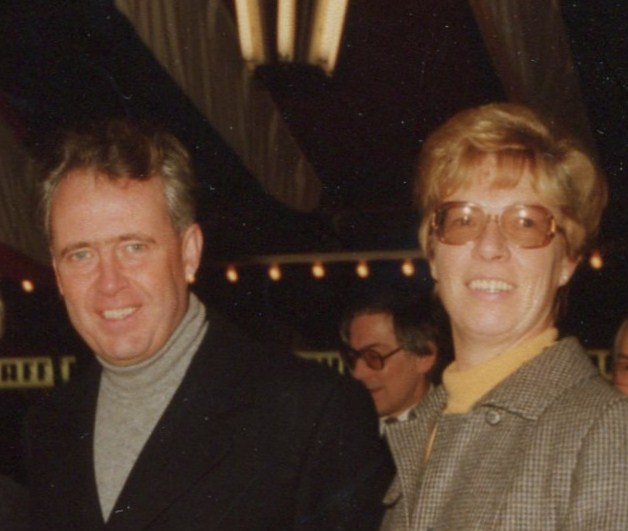 Hans Apel und Frau Ingrid